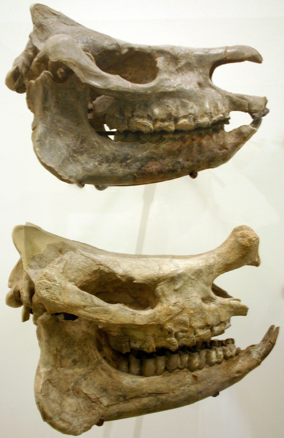 Female and male Menoceras arikarense skulls.